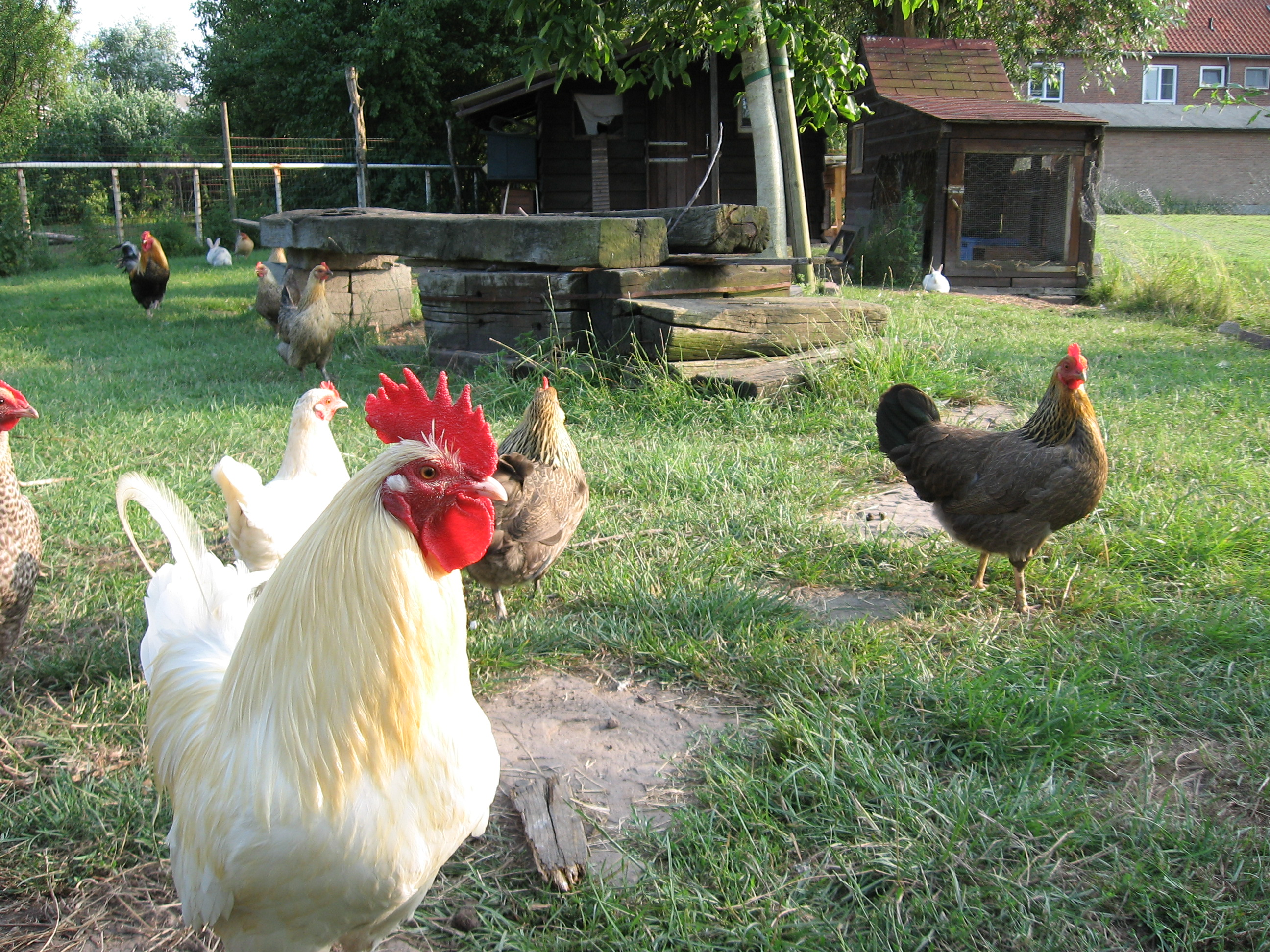 De leider over de kippen, foto gemaakt in eigen kippenweide